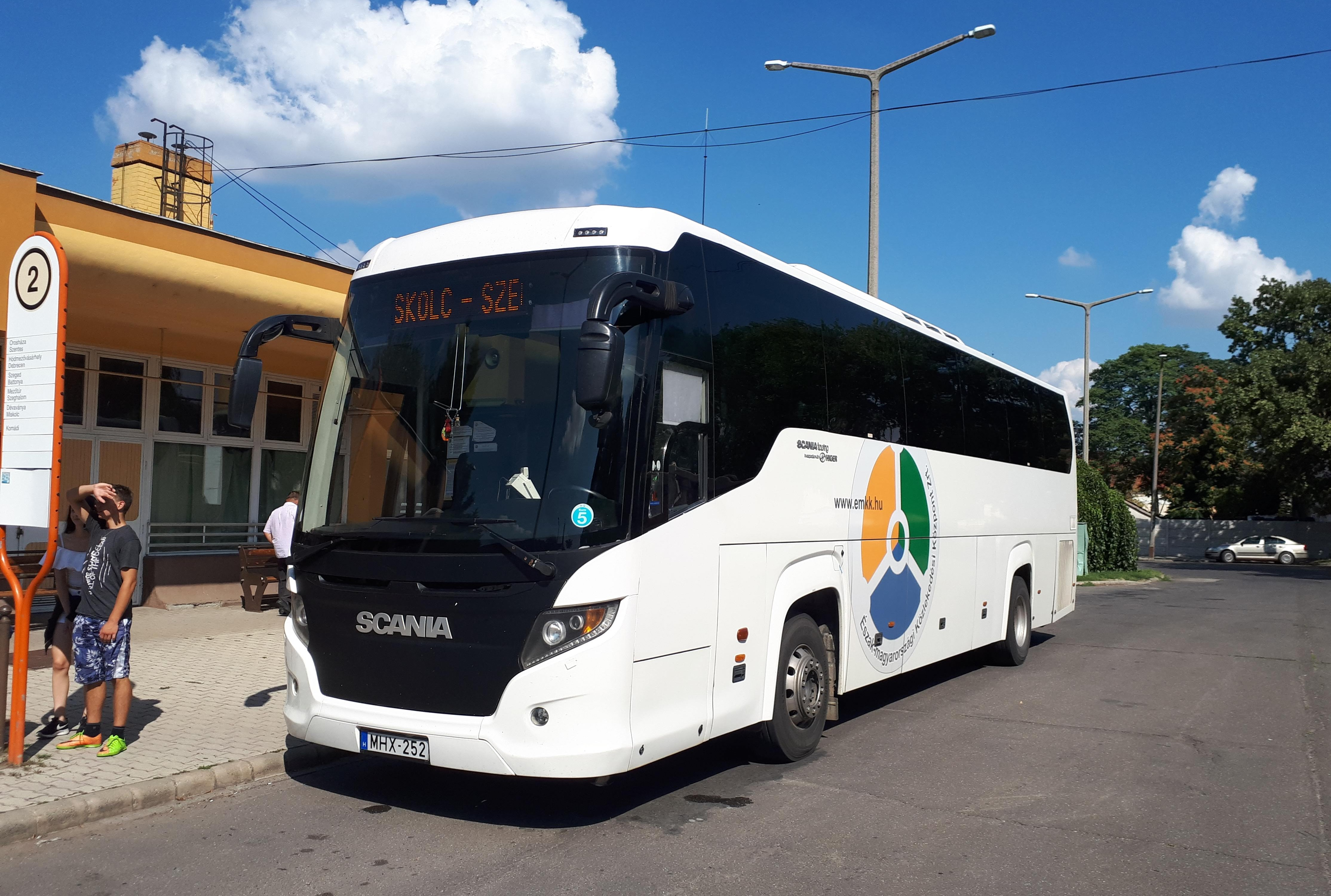 Az ÉMKK MHX-252 rendszámú Scania Higer A80T busza Karcagon, a 1375-ös országos járaton.